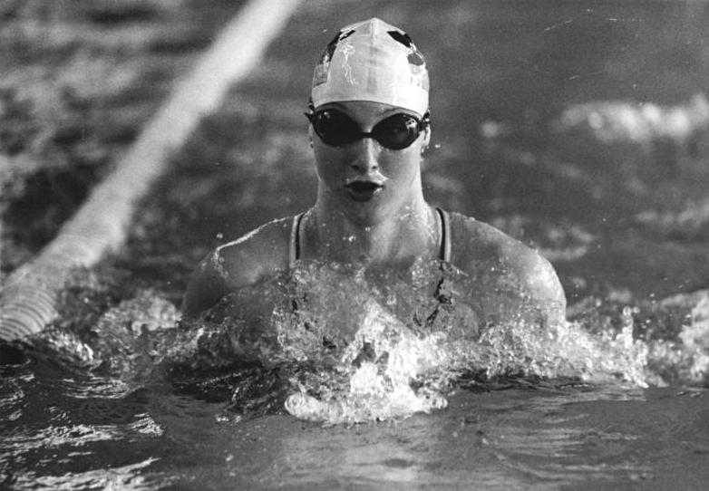 Ute Geweniger ADN-ZB Ludwig-28.5.82 Erfurt: Bei den DDR-Meisterschaften im Sportschwimmen erkämpfte sich am 28.5. auf der 100-m- Bruststrecke Ute Gewinger (SC Karl-Marx-Stadt) in 1:09,59 min erneut einen Sieg. Die Olympiasiegerin war bisher nur selbst, 1981 beim EM-Sieg in Split mit der Weltrekordzeit von 1:08,60 min, schneller auf dieser Distanz. Abgebildete Personen: Geweniger, Ute: Schwimmerin, DDR